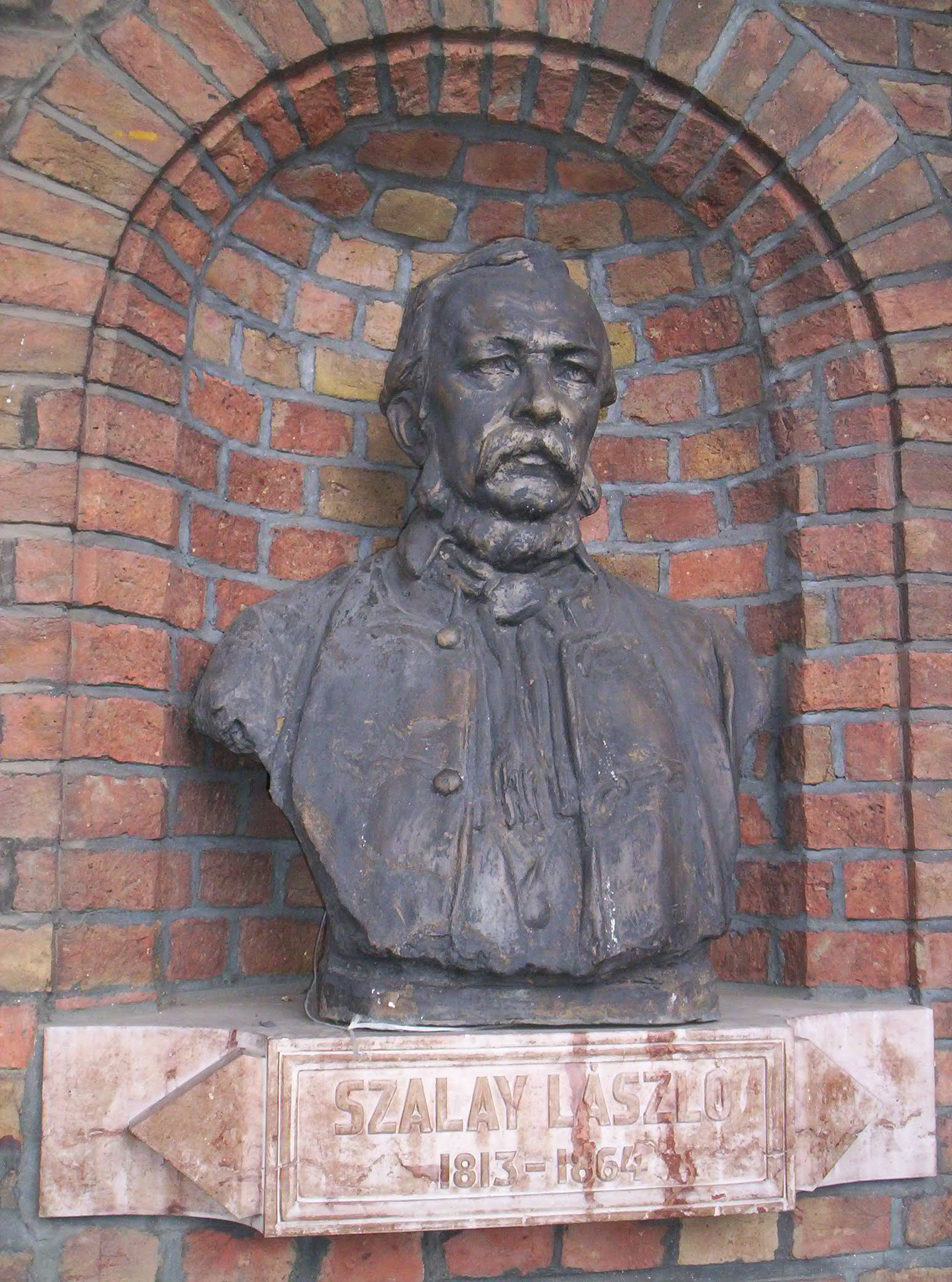 Szalay László szobra Szegeden. Bory Jenő alkotása (1930) – photo taken by uploader User:Csanády